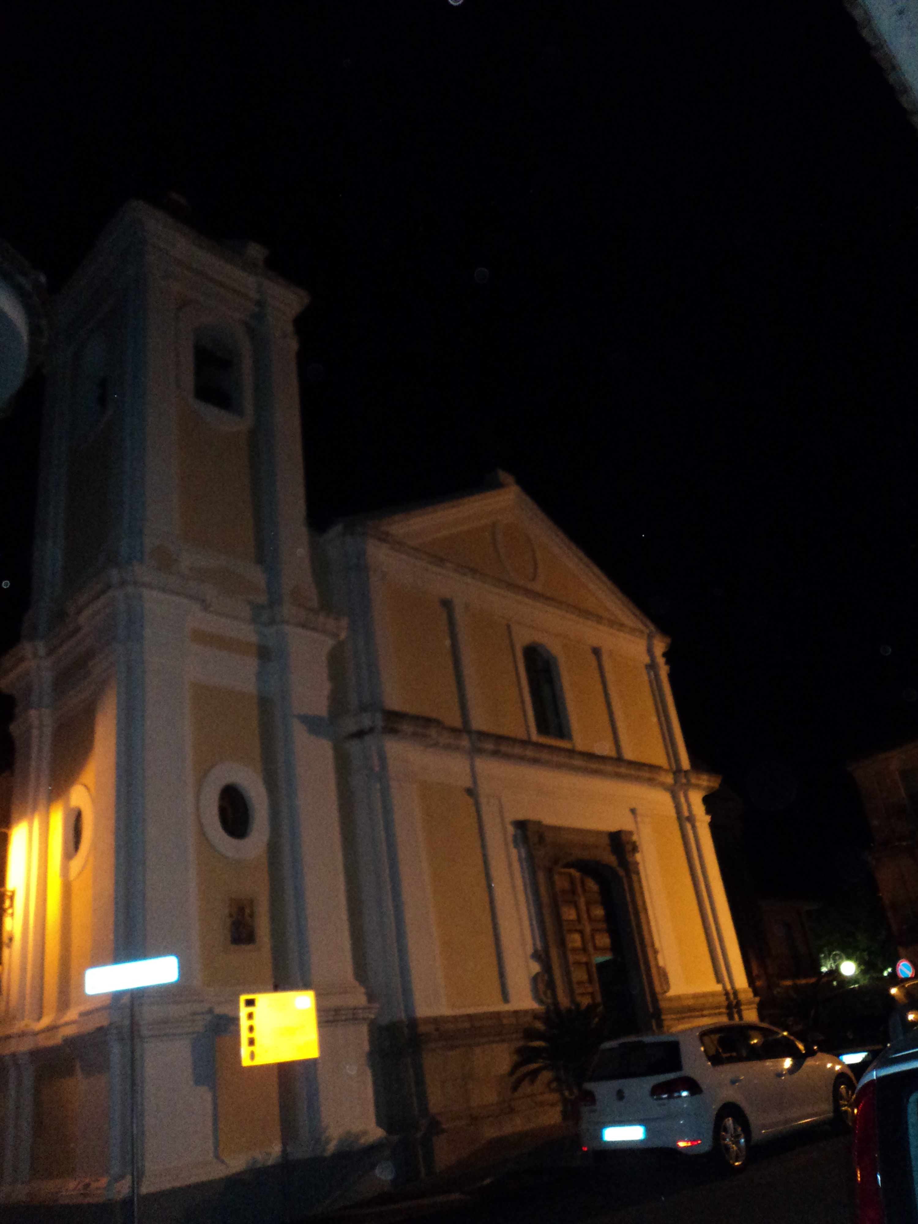 Chiesa del SS.Rosario (Stalettì)